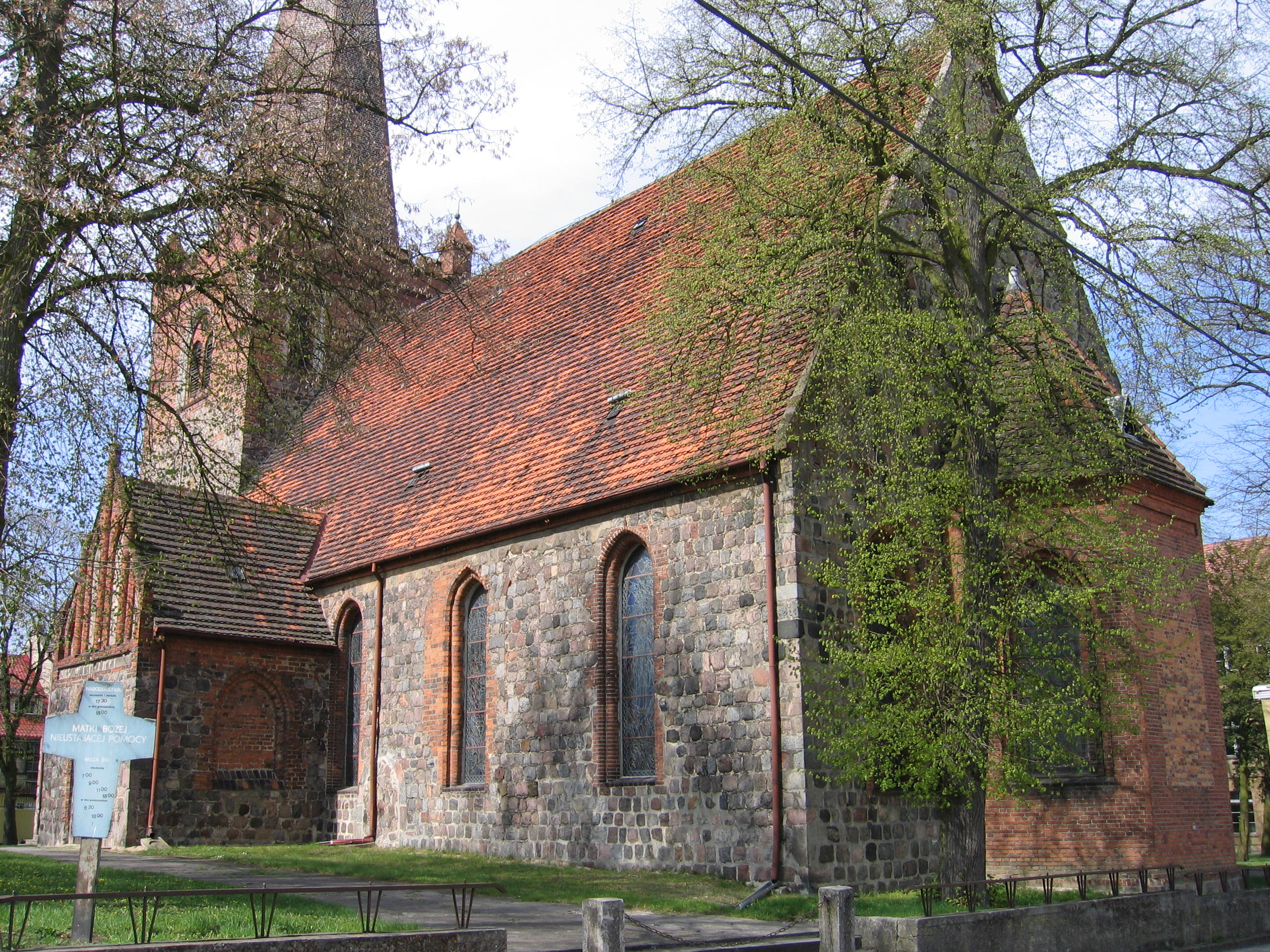 Trzcińsko-Zdrój - kościół p.w. MB Nieustającej Pomocy